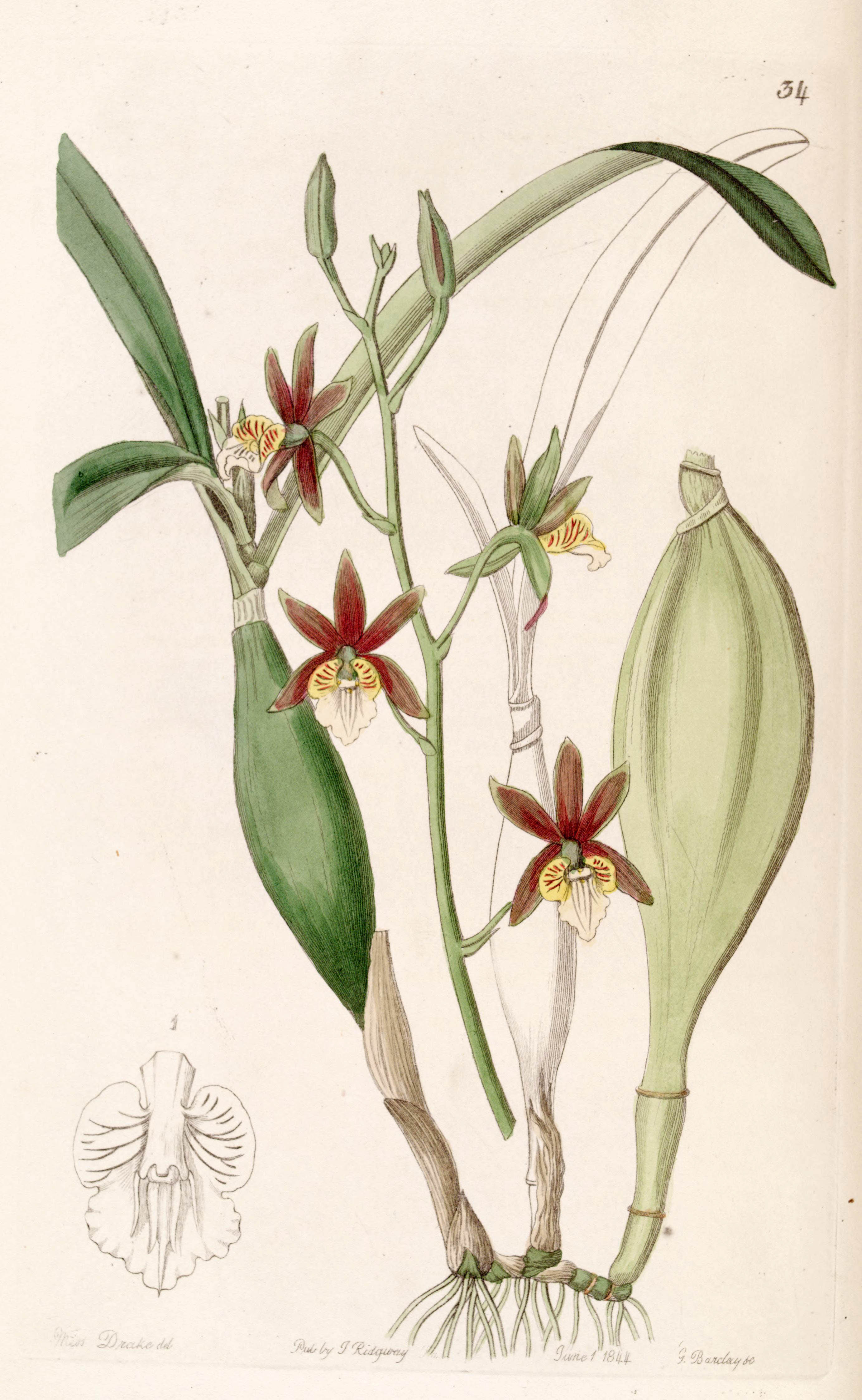 Prosthechea pterocarpa (as syn. Epidendrum pterocarpum )